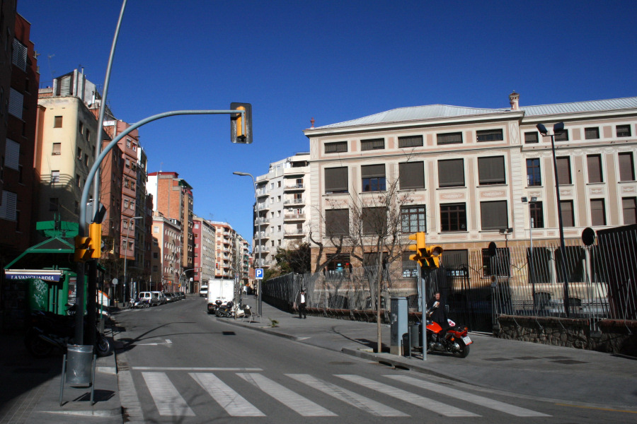 Riera Blanca